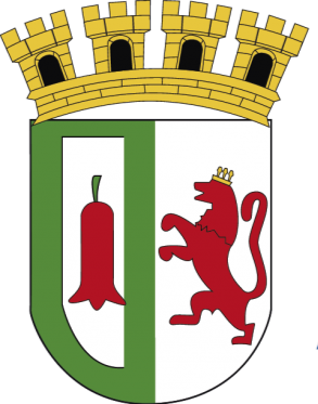 ESCUDO DE LA CIUDAD DE ARAUCO